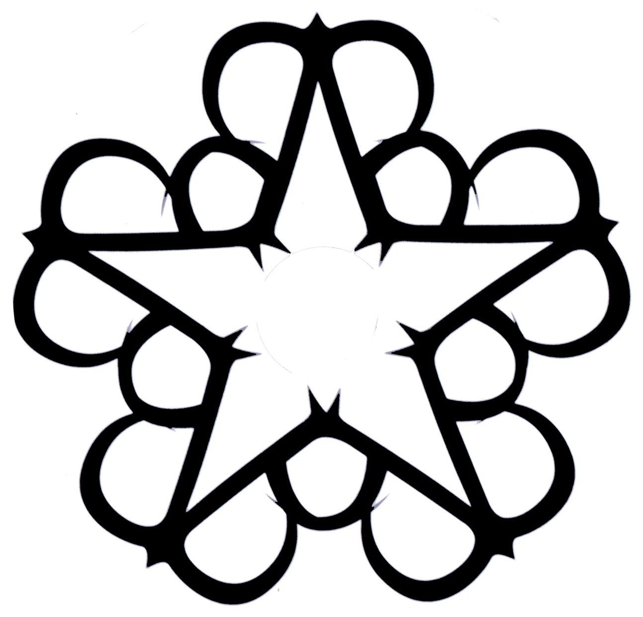 Logotipo en forma de estrella utilizado por Black Veil Brides. La estrella está formada por la siglas "BVB" repetida cinco veces.